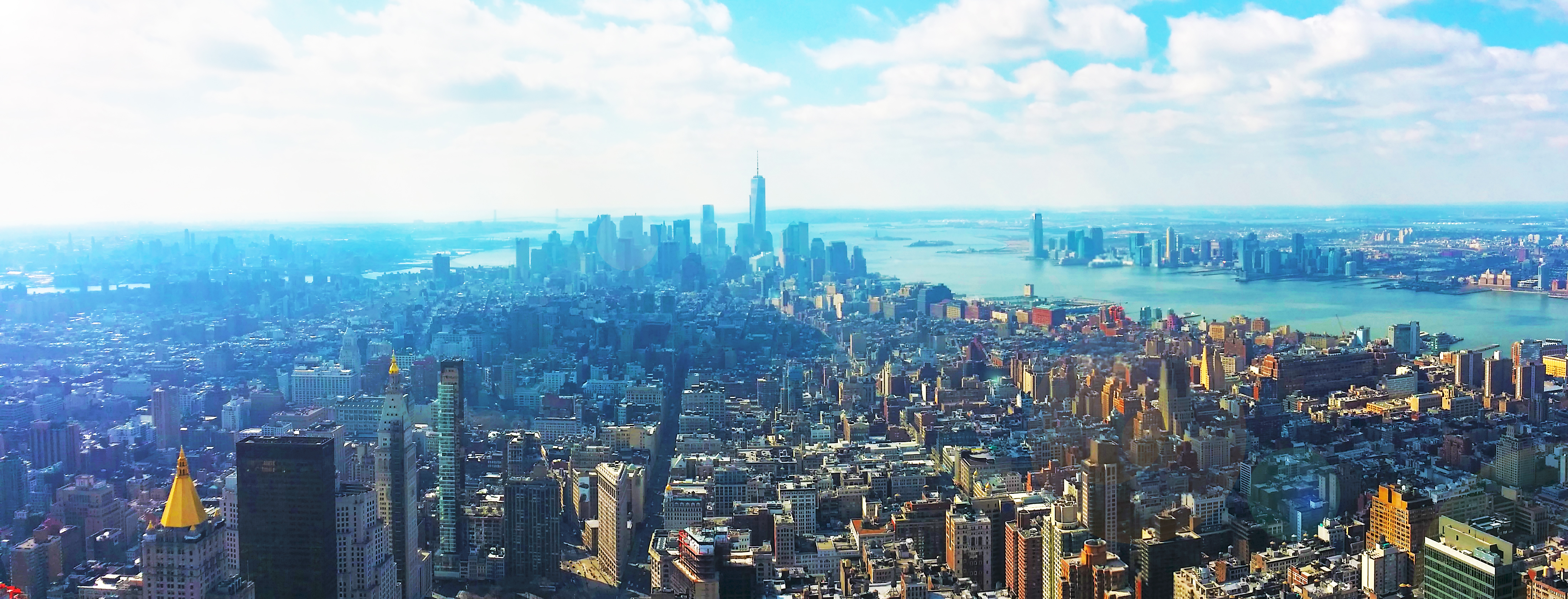 Fotografie von New York City, Blickrichtung Süden, aufgenommen vom Empire State Building